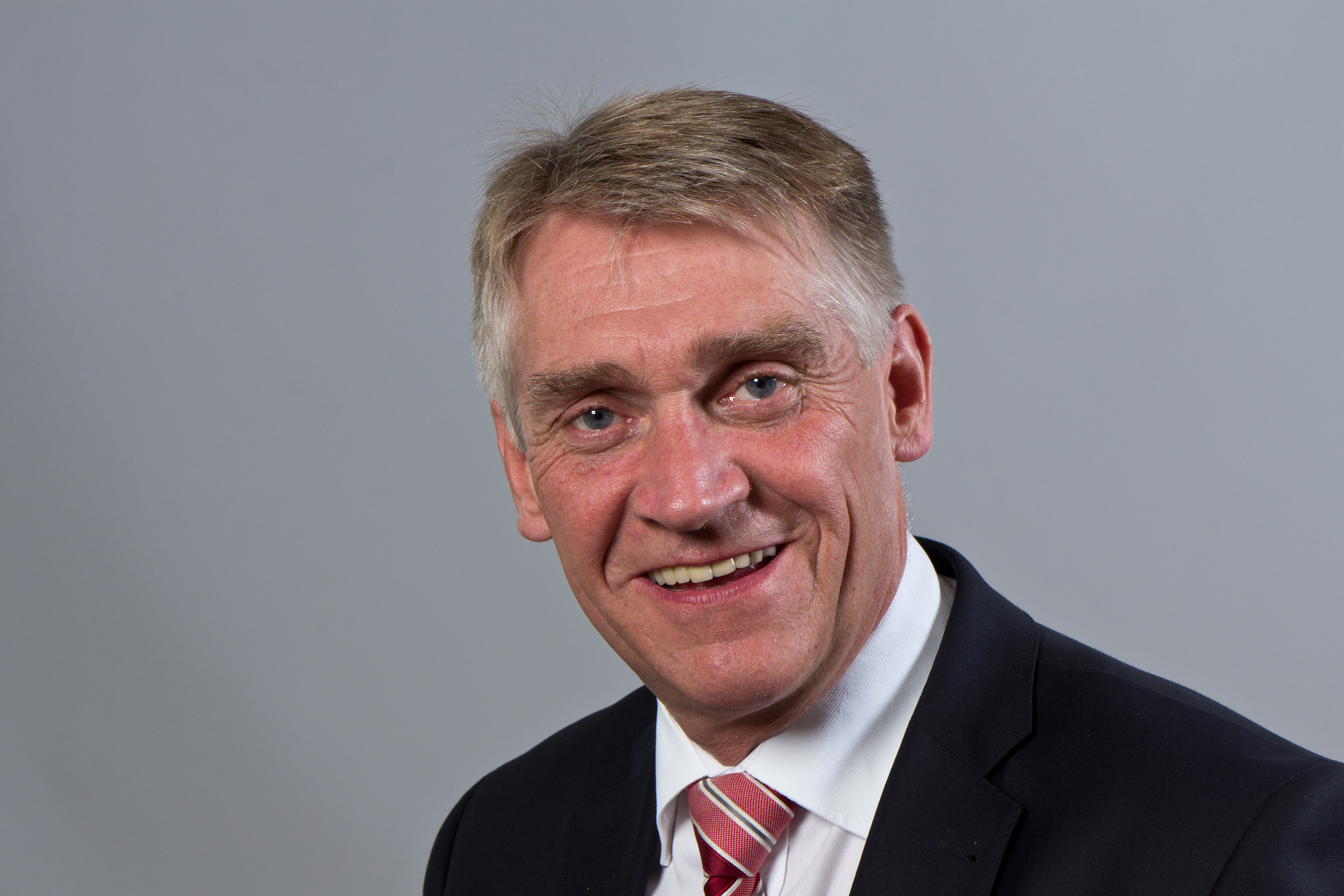 Hans Hinrich Neve (* 30. September 1957 in Stafstedt) ist ein deutscher Landwirt, Politiker (CDU) und Mitglied des Landtages von Schleswig-Holstein. Wikipedia im Landtag – Schleswig-Holstein 21.–23. August 2013 in Kiel Fragen zur Nachnutzung Wenn Sie Fragen zur Nachnutzung dieses Bildes haben, können Sie sich jederzeit gern an wenden Personality rights warningAlthough this work is freely licensed or in the public domain, the person(s) shown may have rights that legally restrict certain re-uses unless those depicted consent to such uses. In these cases, a model release or other evidence of consent could protect you from infringement claims.